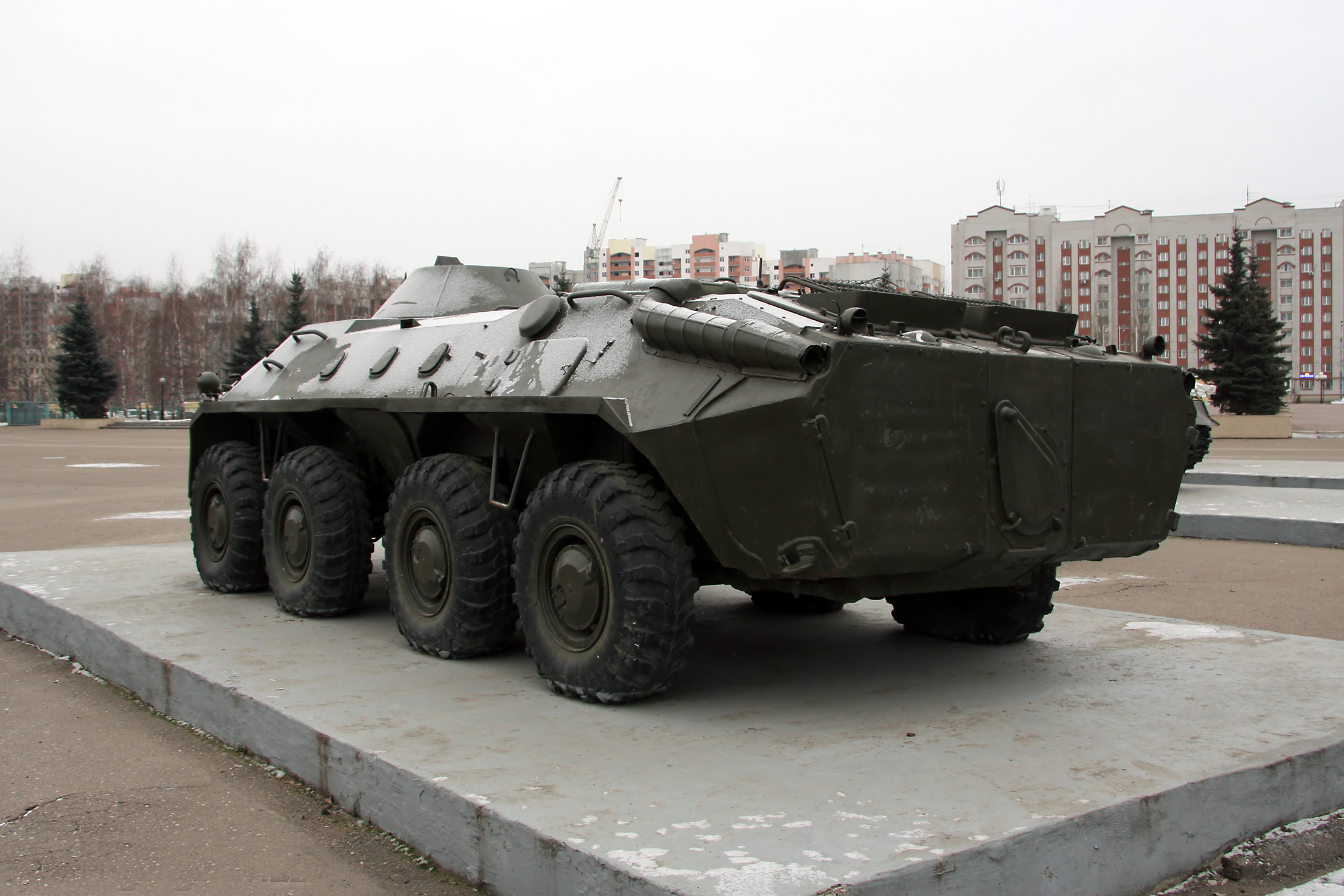 БТР-70 (BTR-70)